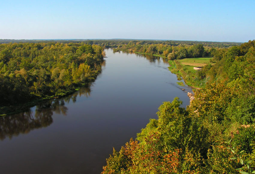 Drohiczyn -rzeka Bug, widok z Góry Zamkowej, autor: Jarosław Bryła